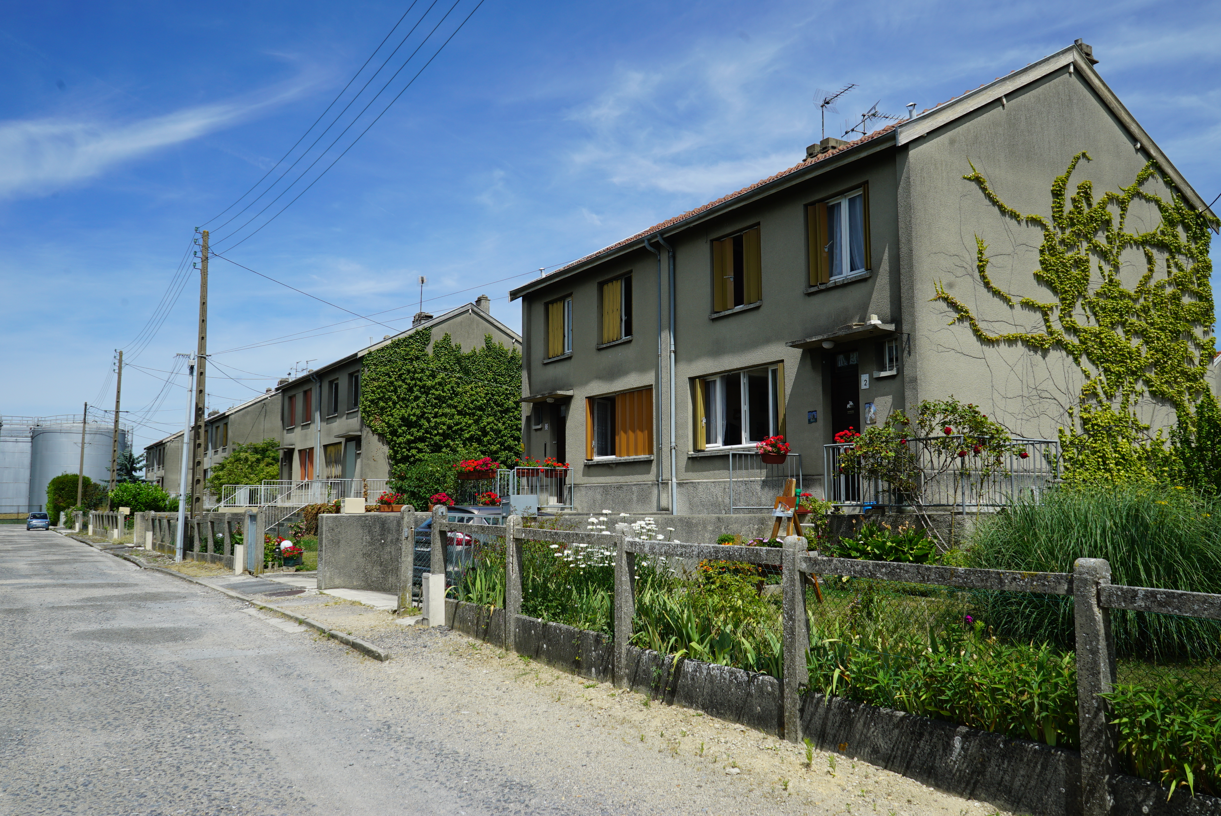 autour de la verrerie VMC de Reims/Saint-Brice.